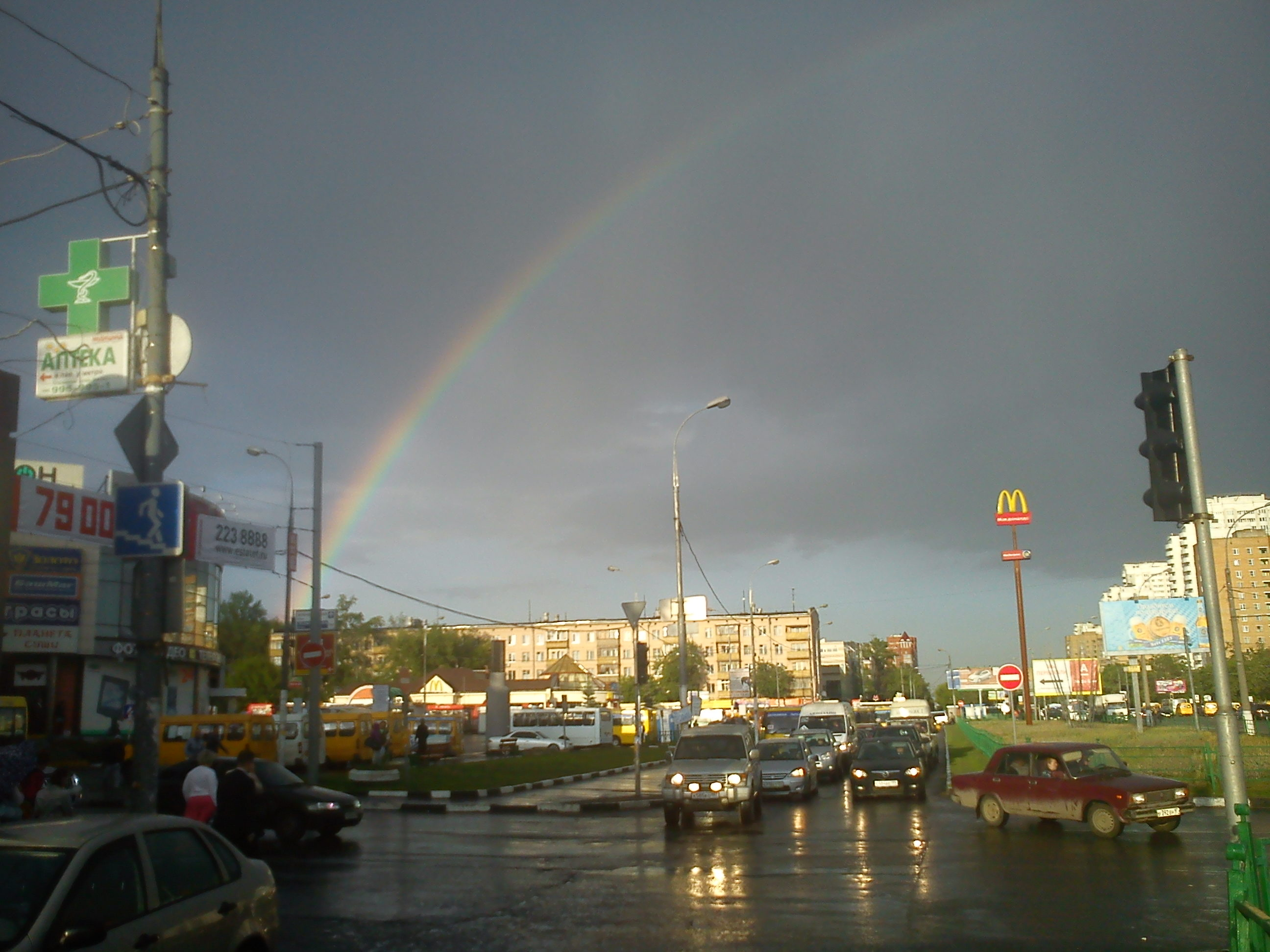 Kuzminki District, Moscow, Russia